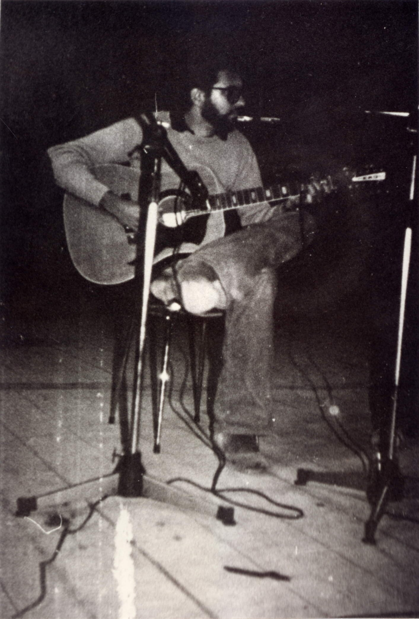 Carlo Venturino, vocalist degli Amici del Vento, al "Campo Hobbit I" a Montesarchio (BN).